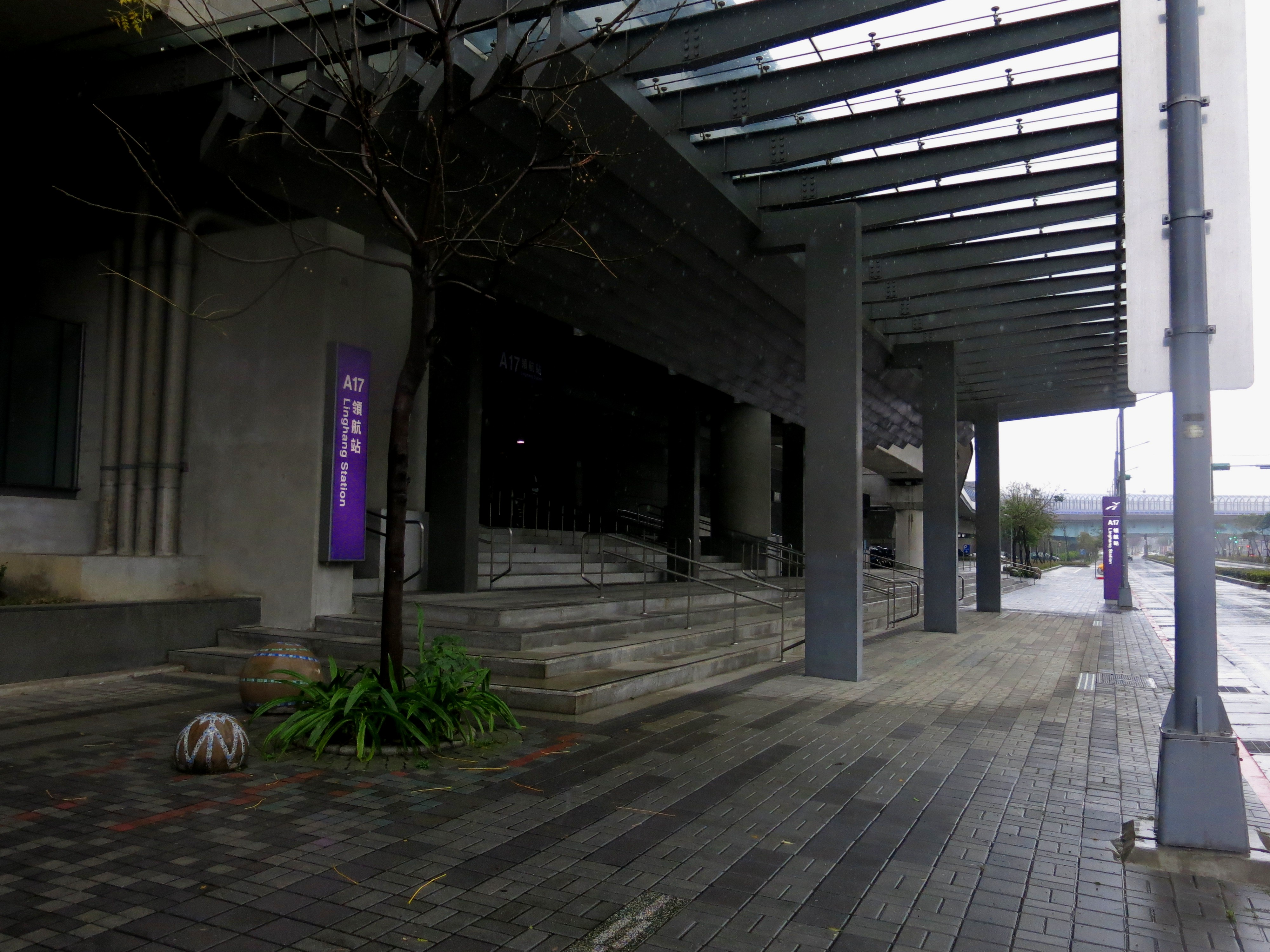 中文（台灣）: 桃園捷運機場線A17領航站